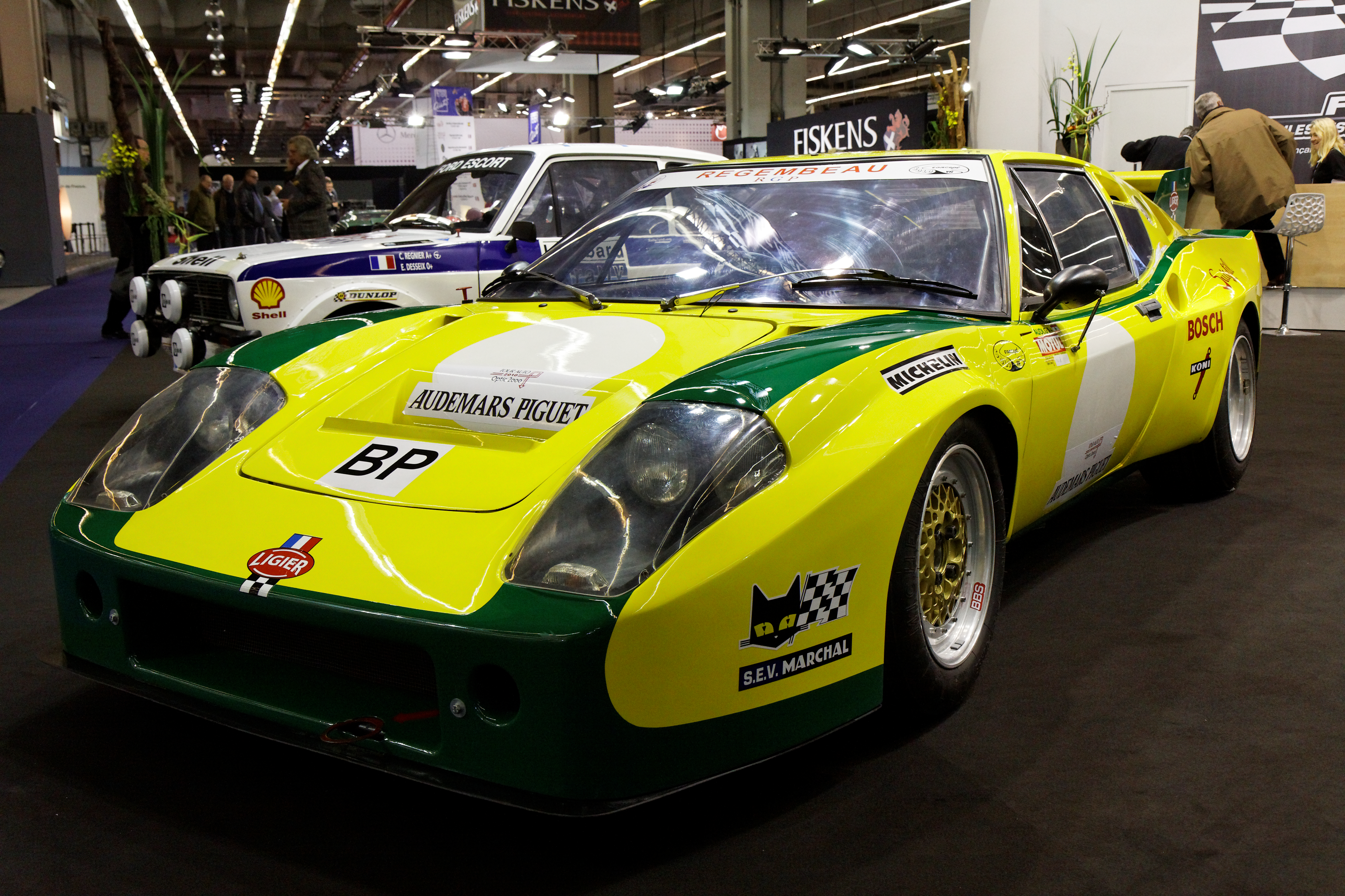 Photographie prise lors du salon rétromobile 2011 à Paris, porte de Versailles.